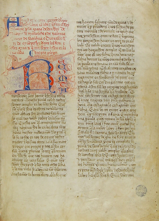 Libre dels Feyts